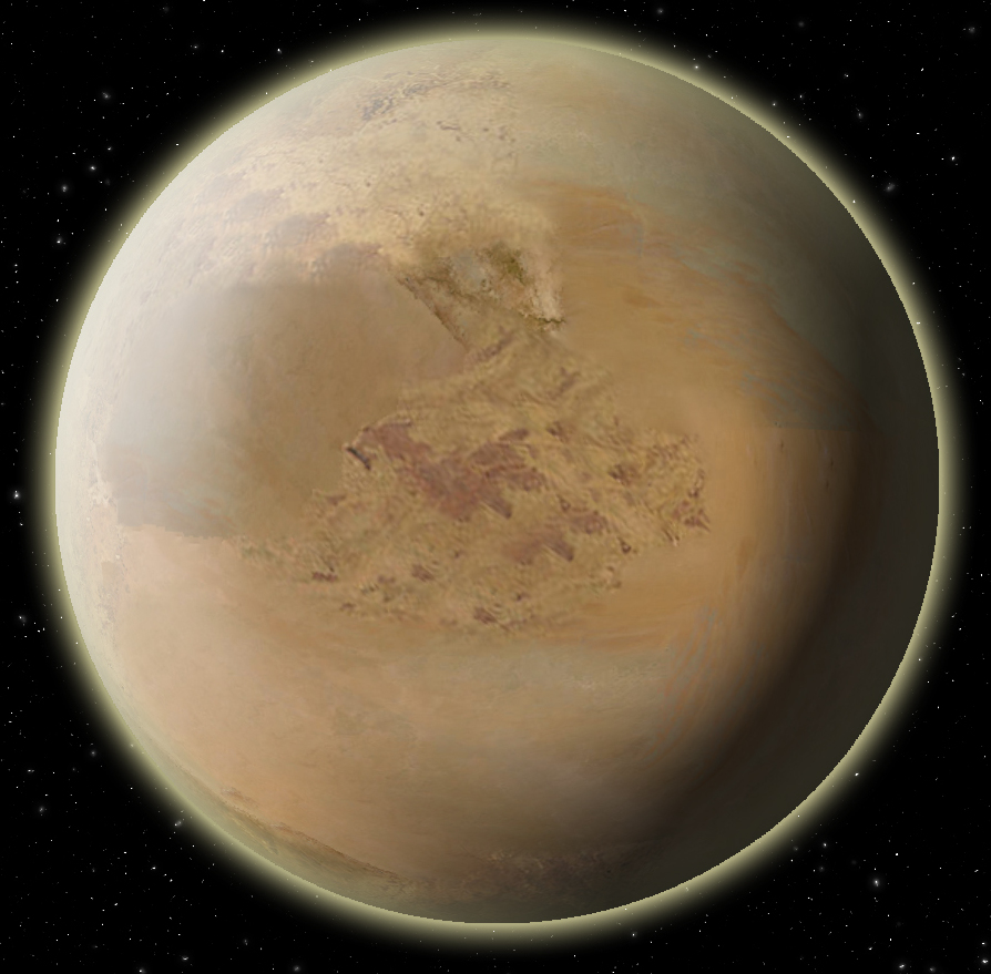 Artist's concept of a desert planet